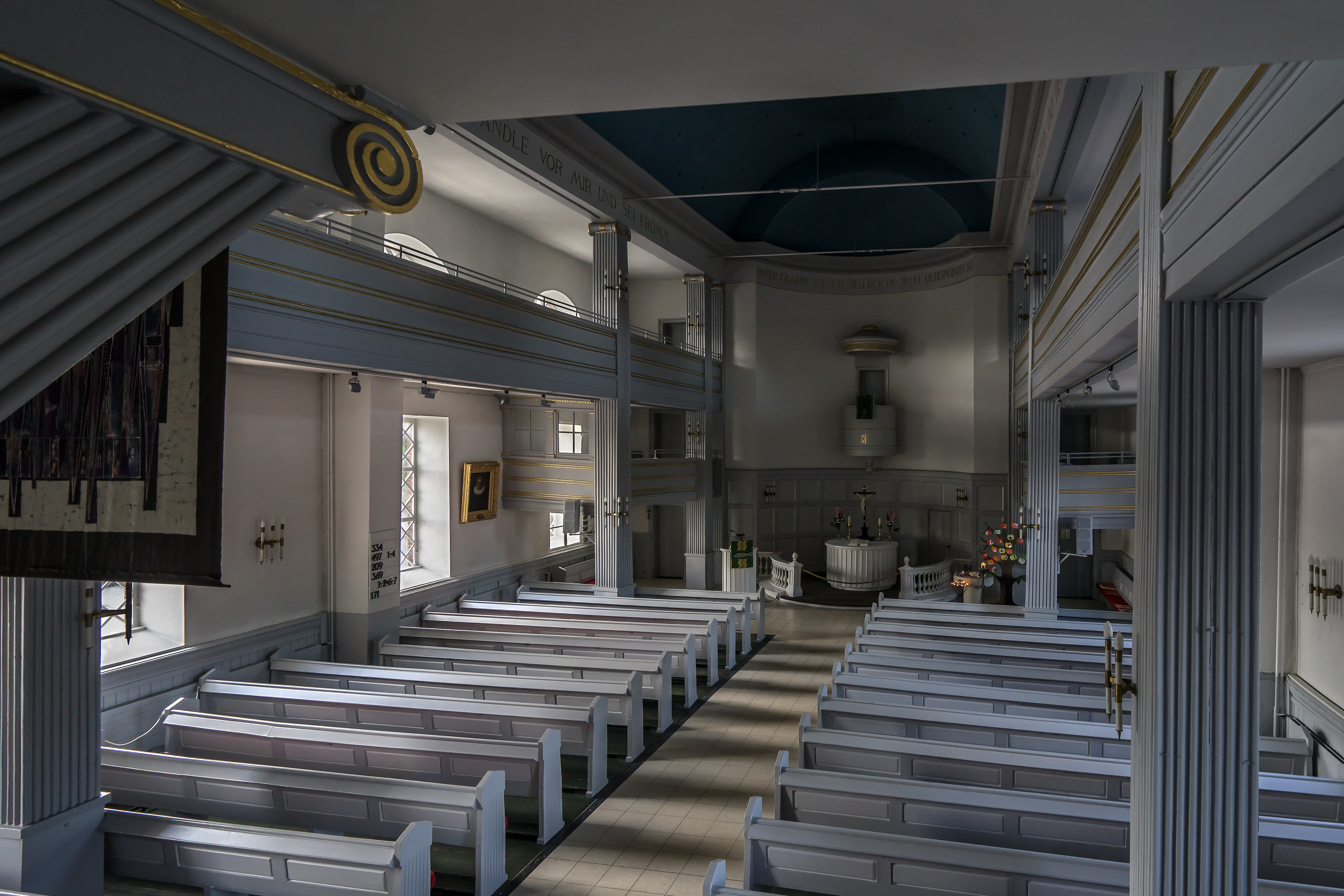 Martinskirche (Blick von der Orgelempore), Cuxhaven-Ritzebüttel